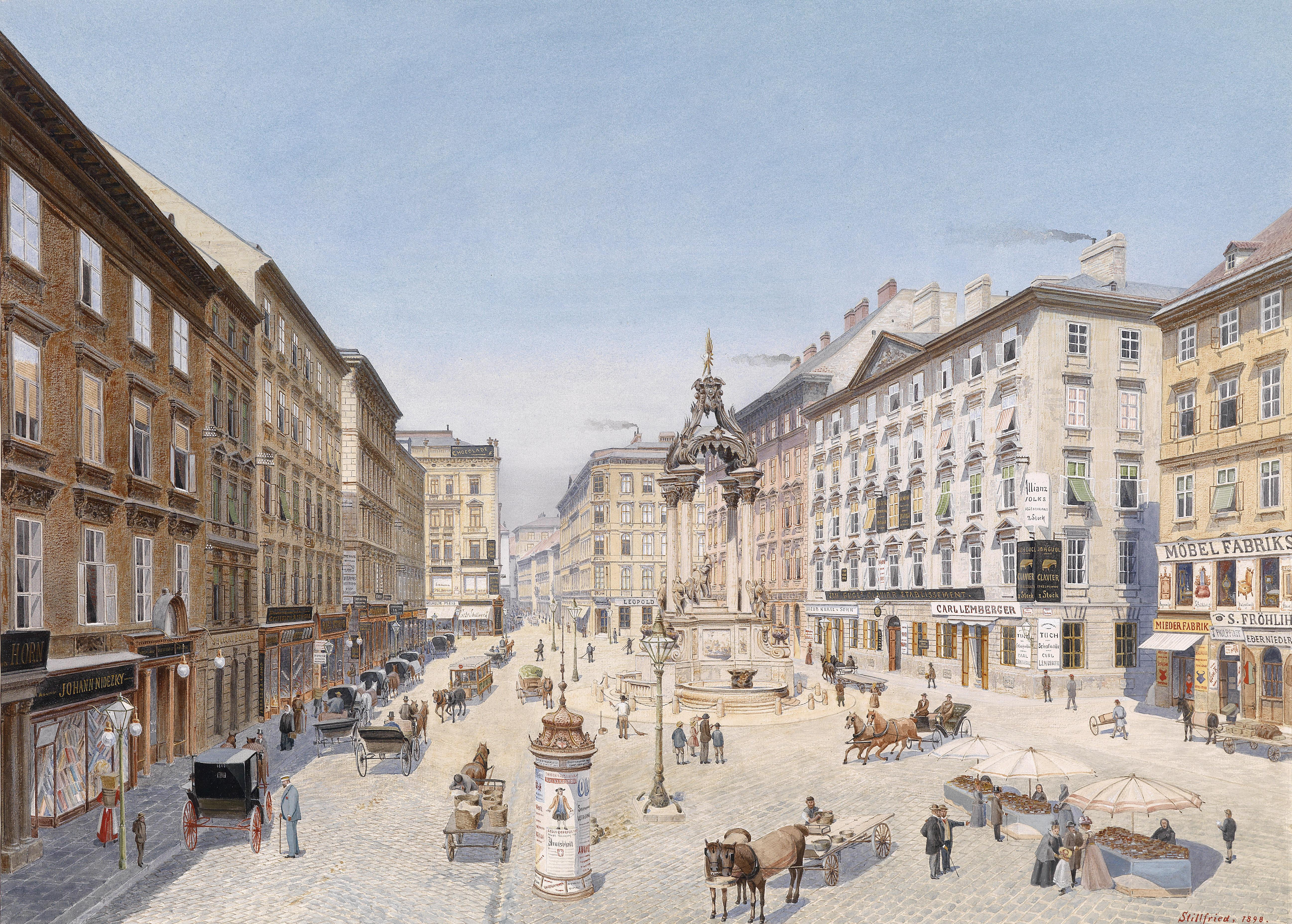 Der Hohe Markt in Wien, signiert und datiert Stillfried 1898, Aquarell auf Papier, 56 x 78 cm